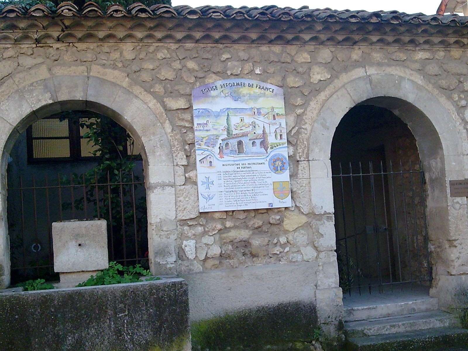 Eglise reformee de Pertuis